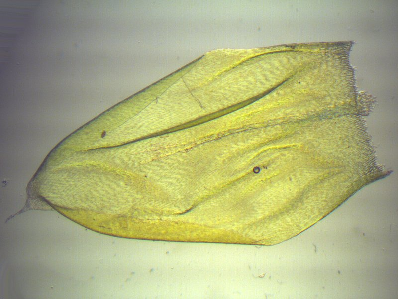 Großes Grünstängelmoos (Scleropodium purum), Blatt, Vergrößerung: 40x